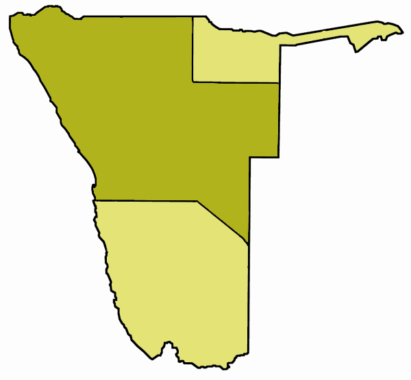 Karte vom Erzbistum Windhoek